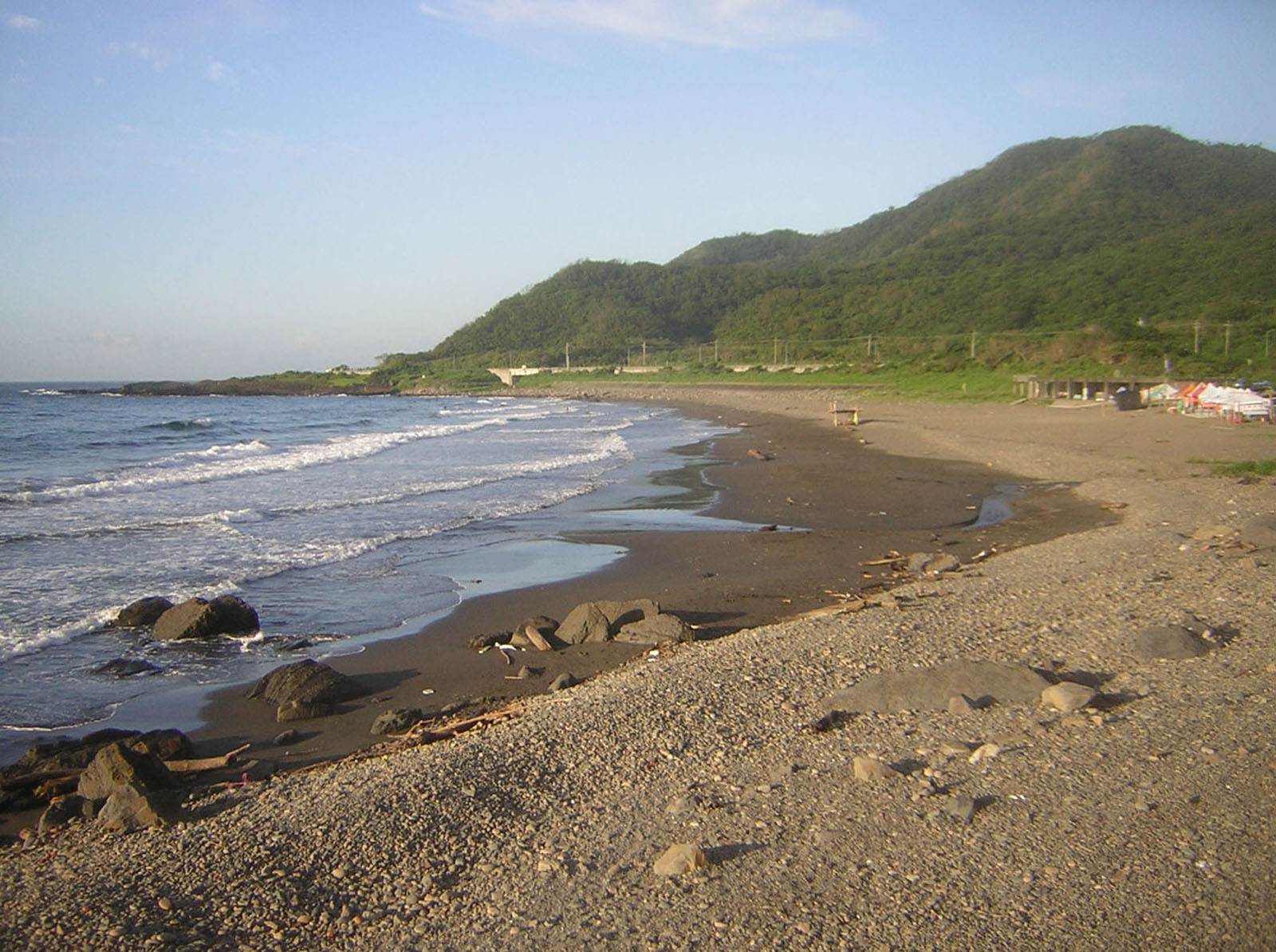 夏日清晨的蜜月灣。 Honeymoon Bay, Yilan County, Taiwan